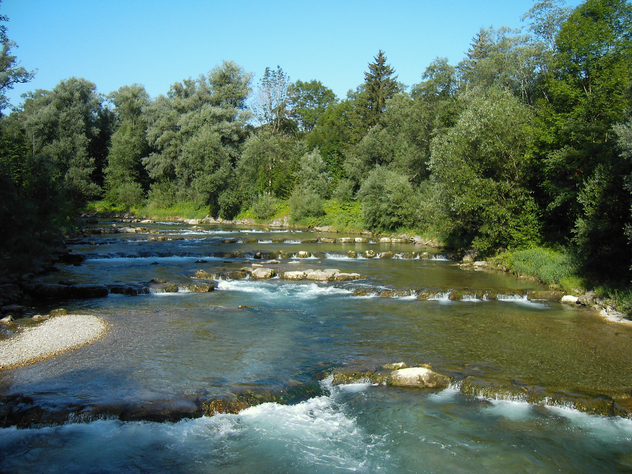 Mangfallknie_(flussaufwärts)